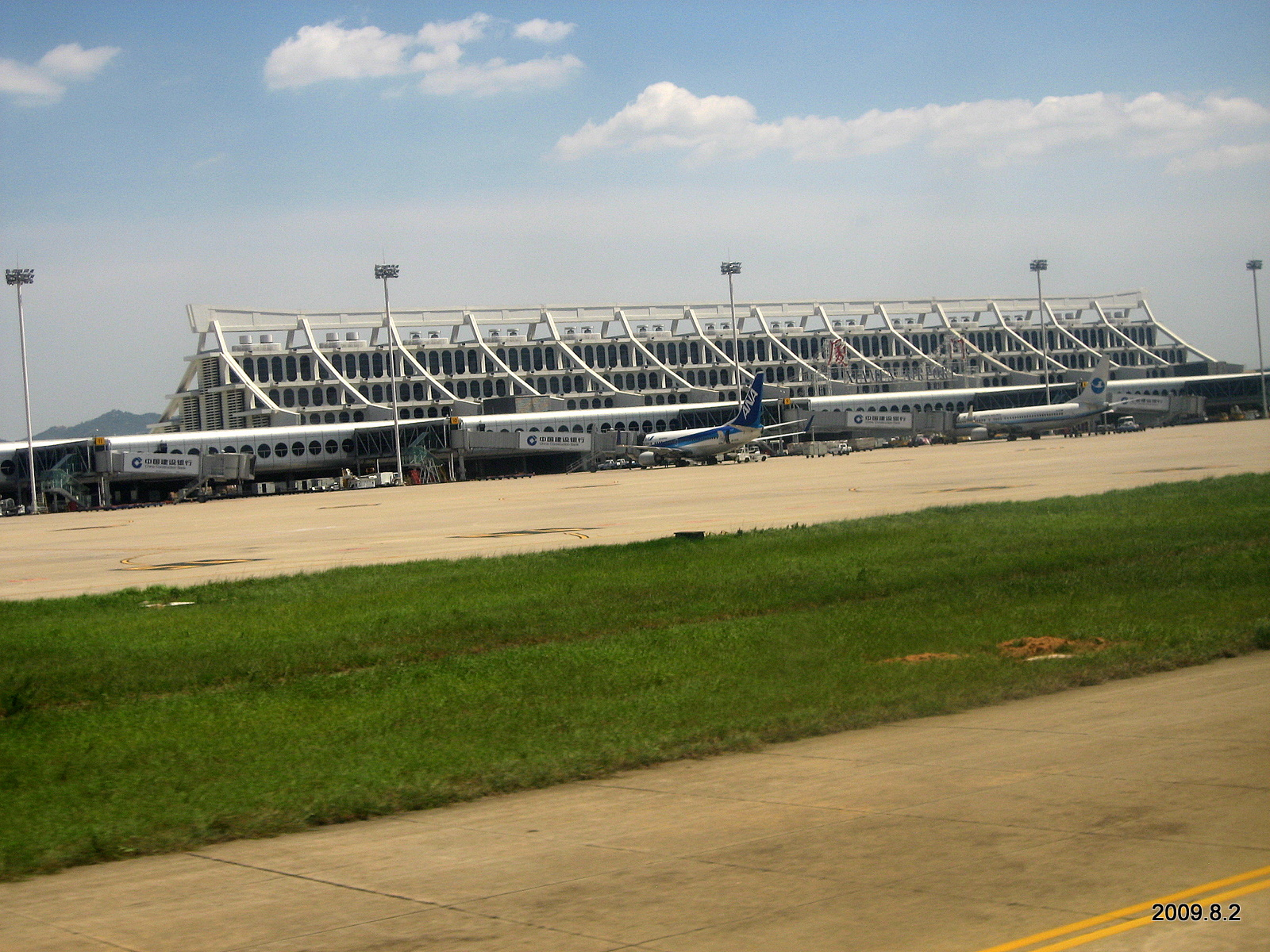 厦门高崎机场